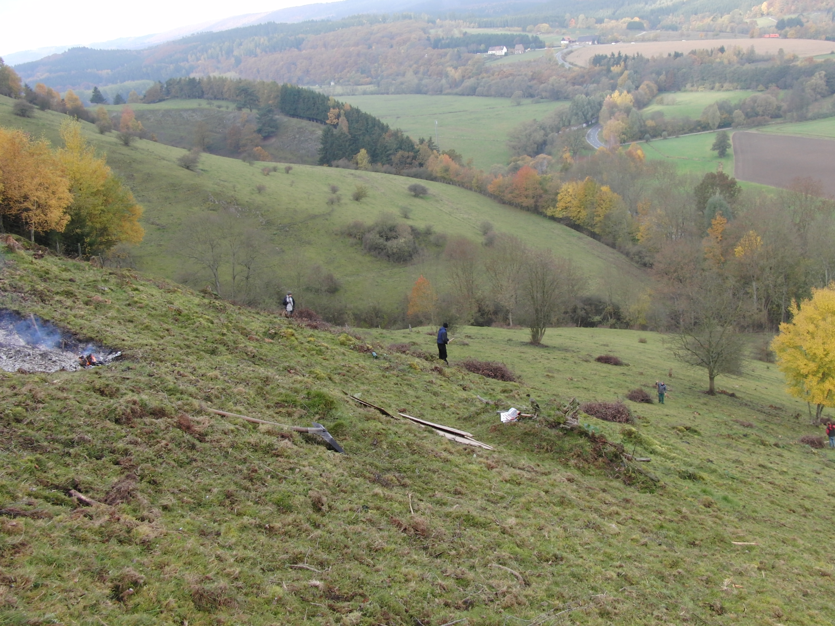 Arbeitseinsatz im NSG Auf der Wiemecke. Mit Freischneider abgemähte Gehölzaufwuchs wird abgeharkt und verbrannt. In der Aue NSG Unteres Diemeltal; während die Hangbereiche im Hintergrund zum Landschaftsschutzgiet Diemeltalflanken um Niedermarsberg gehören; Berge hinten mit wald gehören zum Landschaftsschutzgebiet Bredelarer Kammer / Fürstenberger Wald; Hauser gehören zu Niedermarsberg